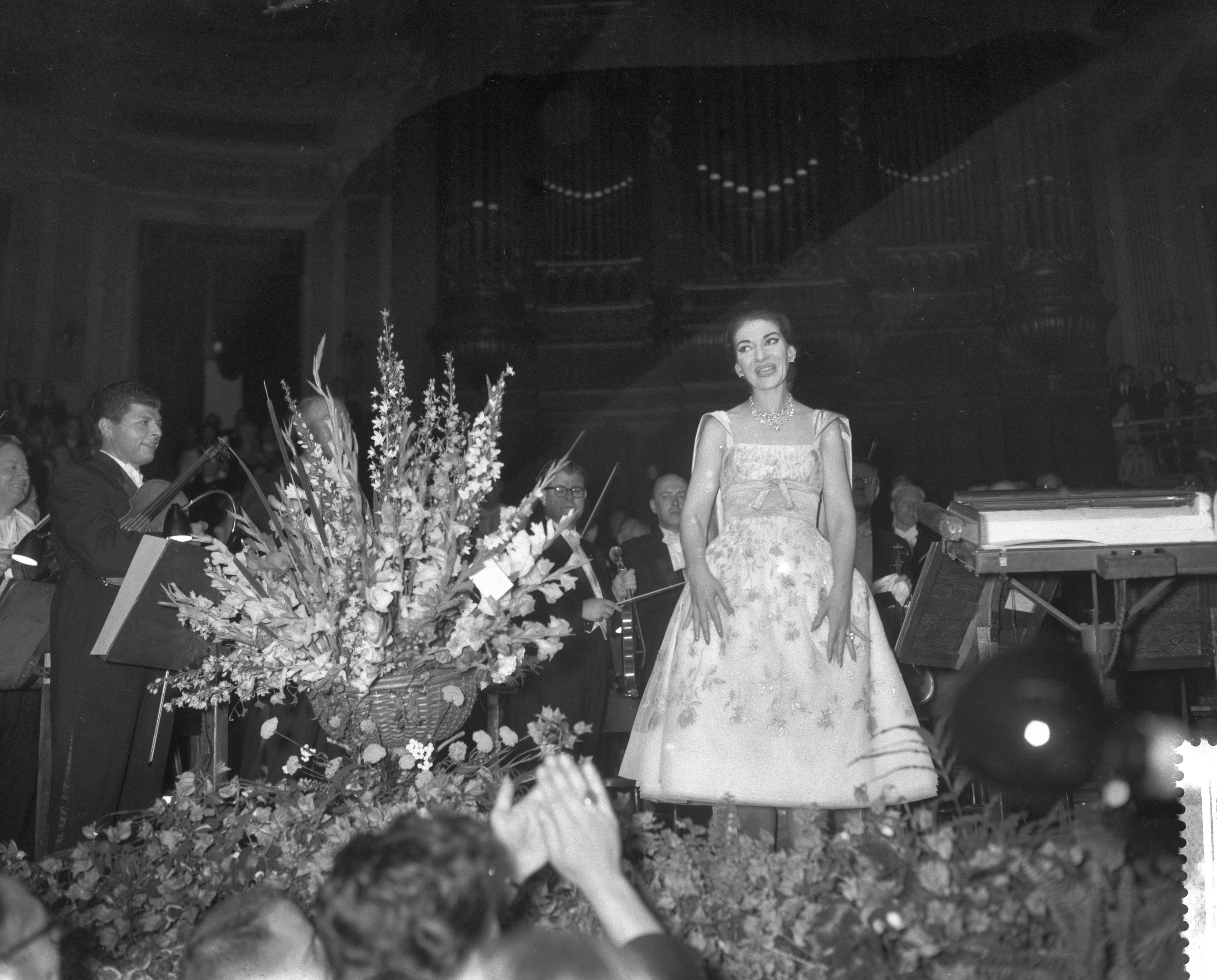 Collectie / Archief : Fotocollectie Anefo Reportage / Serie : [ onbekend ] Beschrijving : Concert van Maria Callas in het Concertgebouw te Amsterdam, Maria Callas bedankt voor het applaus Datum : 11 juli 1959 Fotograaf : Bilsen, Joop van / Anefo Auteursrechthebbende : Nationaal Archief Materiaalsoort : Negatief (zwart/wit) Nummer archiefinventaris : bekijk toegang 2.24.01.04 Bestanddeelnummer : 910-5165